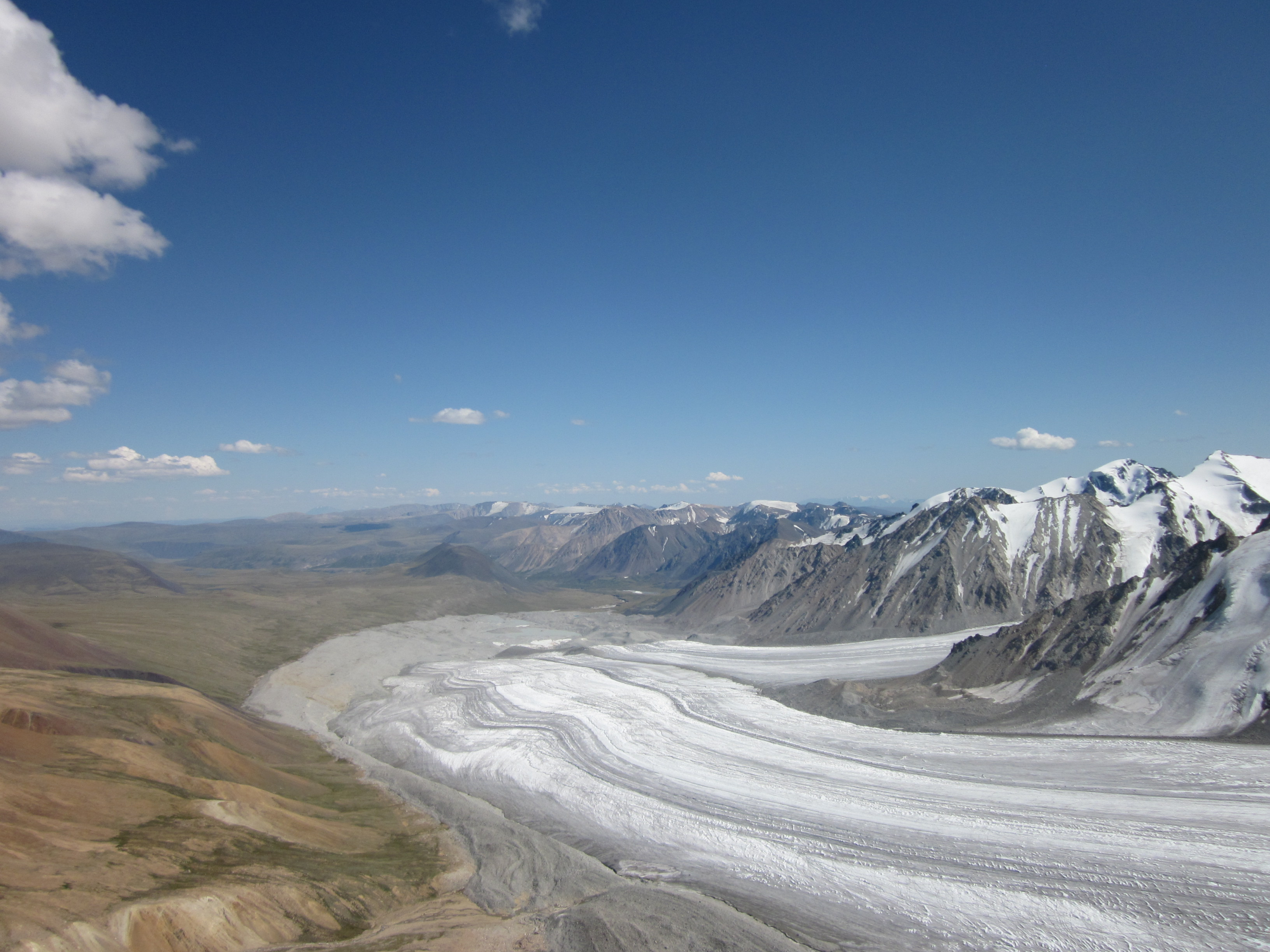 תנועת קרחונים במונגוליה